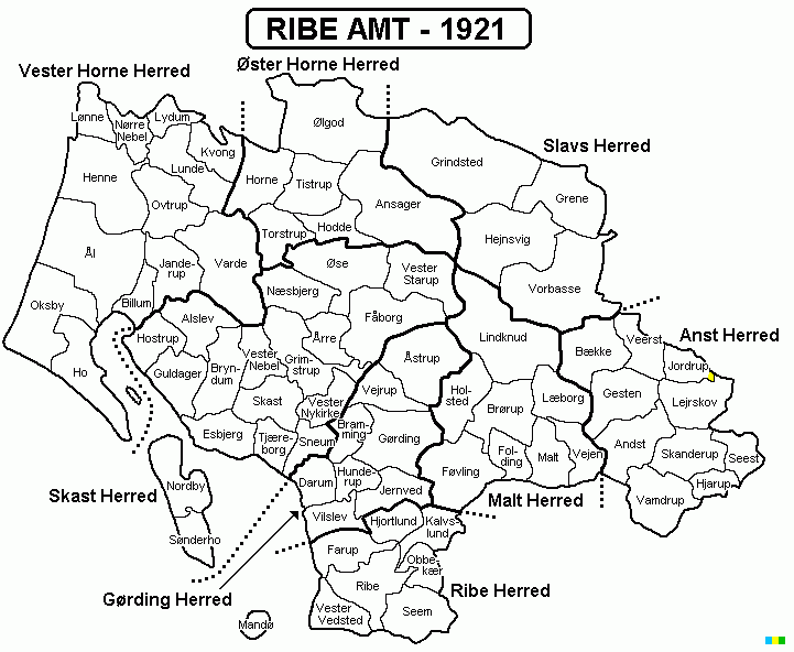 Kort over Ribe Amt 1921, Denmark Source: Map by Svend-Erik Christiansen